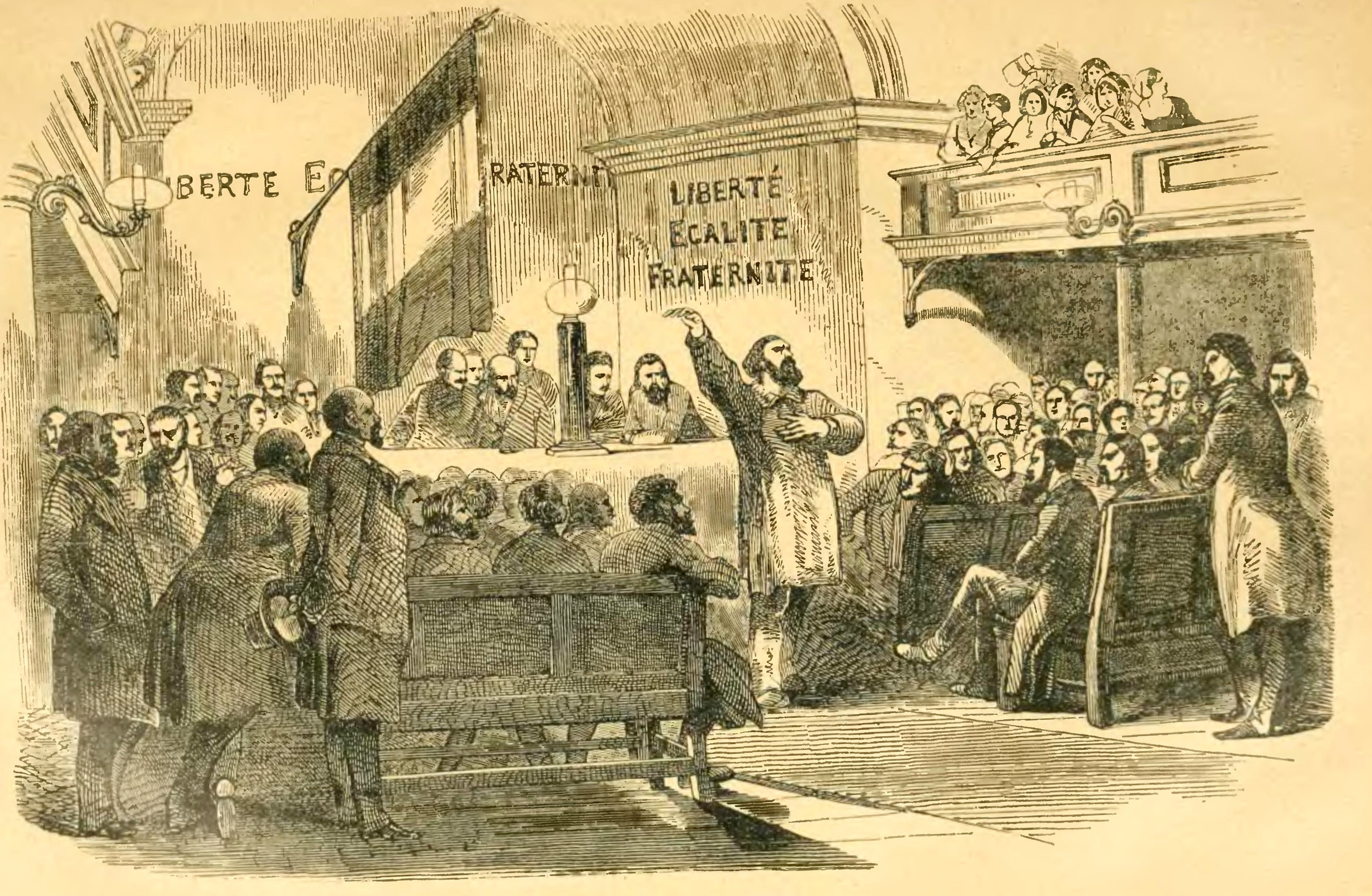 Histoire socialiste sous la direction de Jean Jaurès 1908, Volume 9, la 2e République, illustration page 37